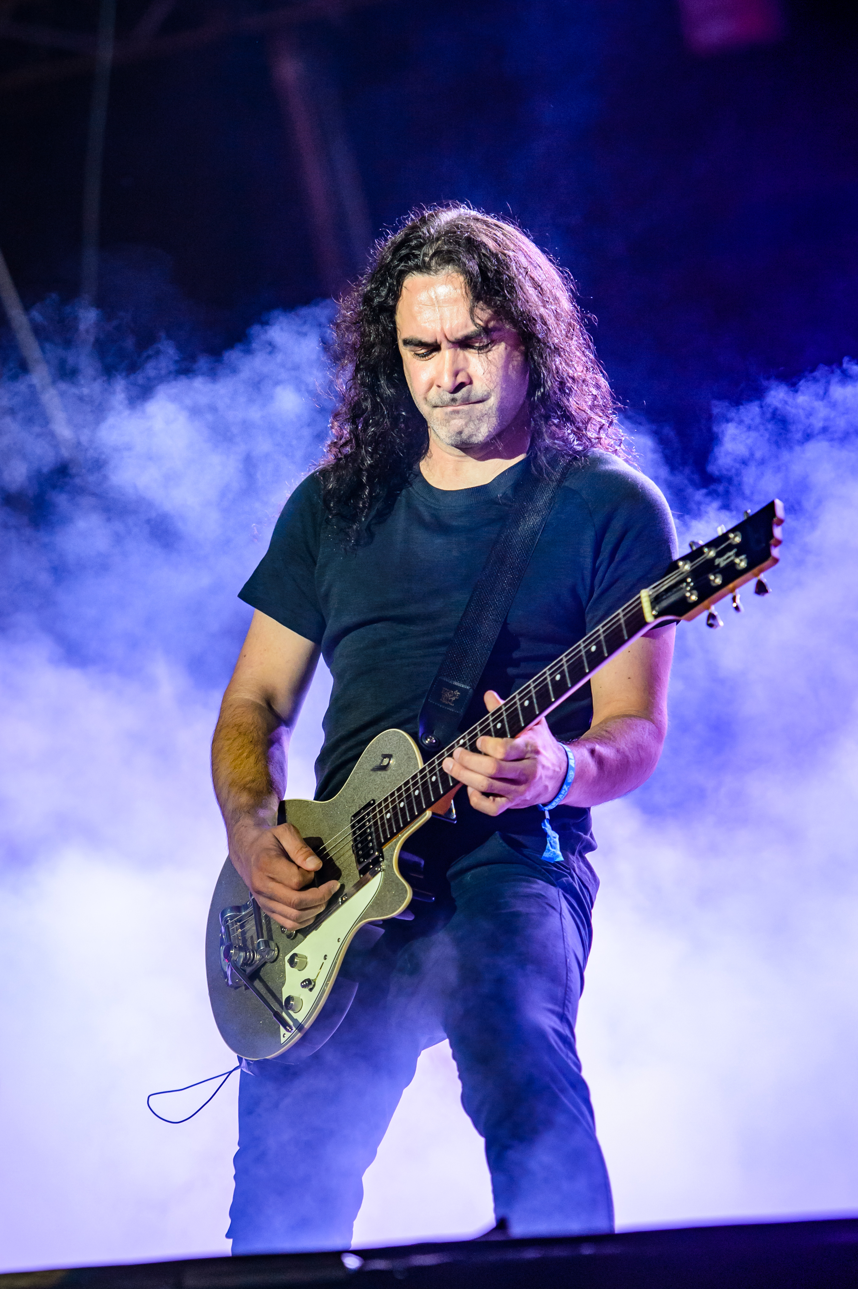 'RockHarz Open Air 2016; Ballenstedt': 'Avantasia'